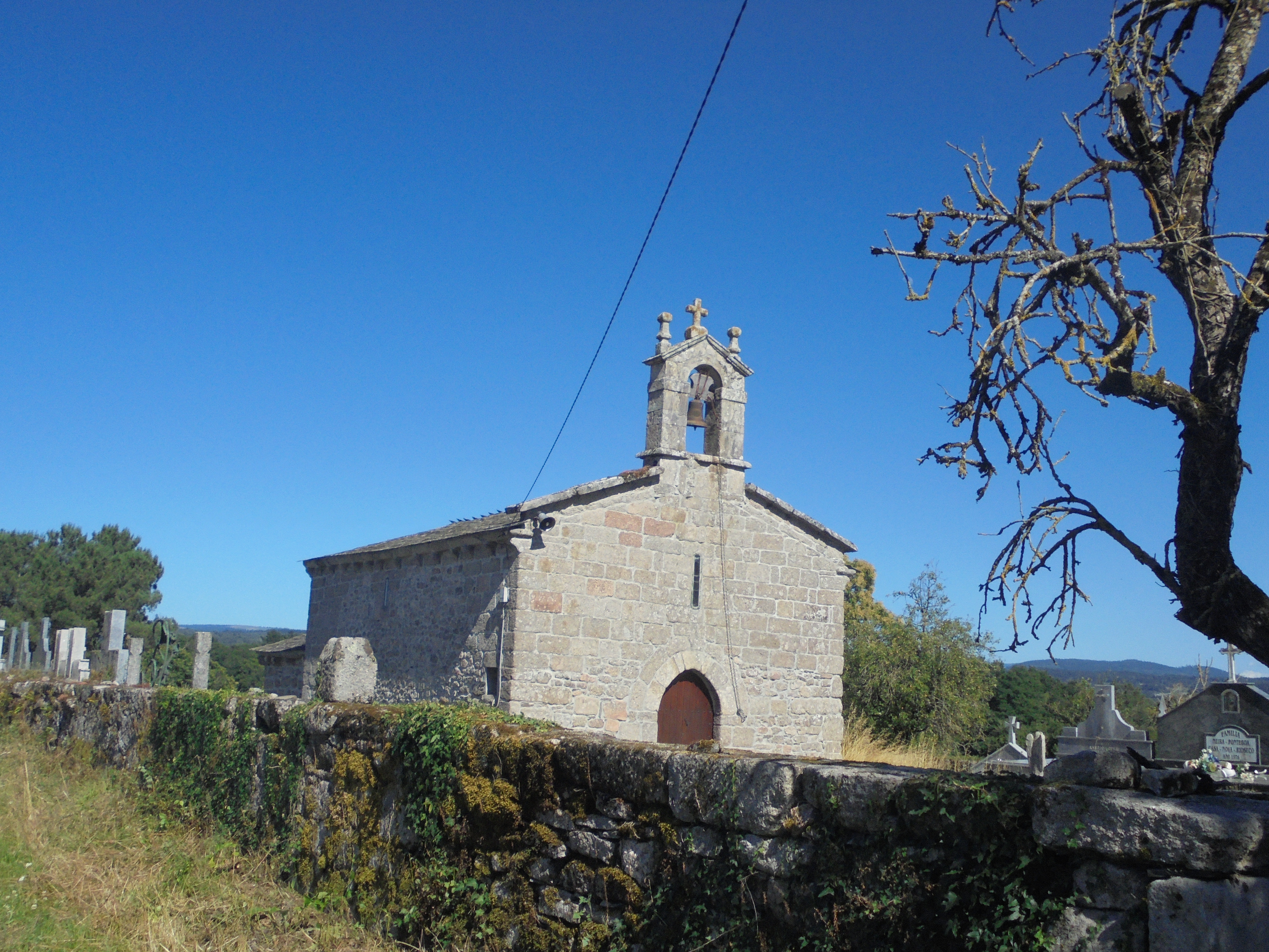 Igrexa parroquial de Campelo ( O Corgo)